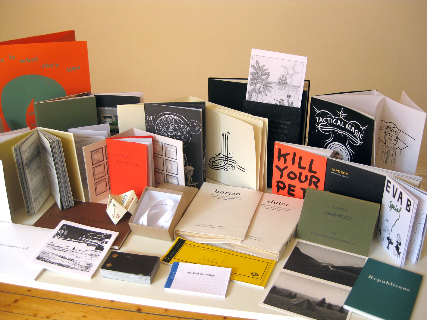 Exempel på konst i bokform.